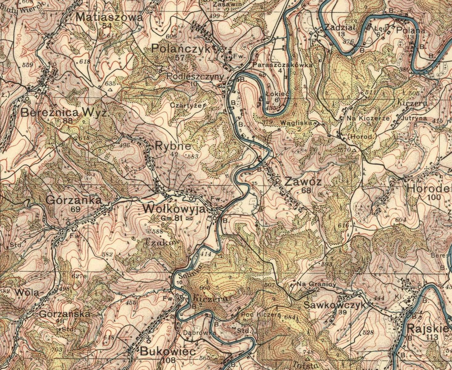 one piece Solina district map (1937)